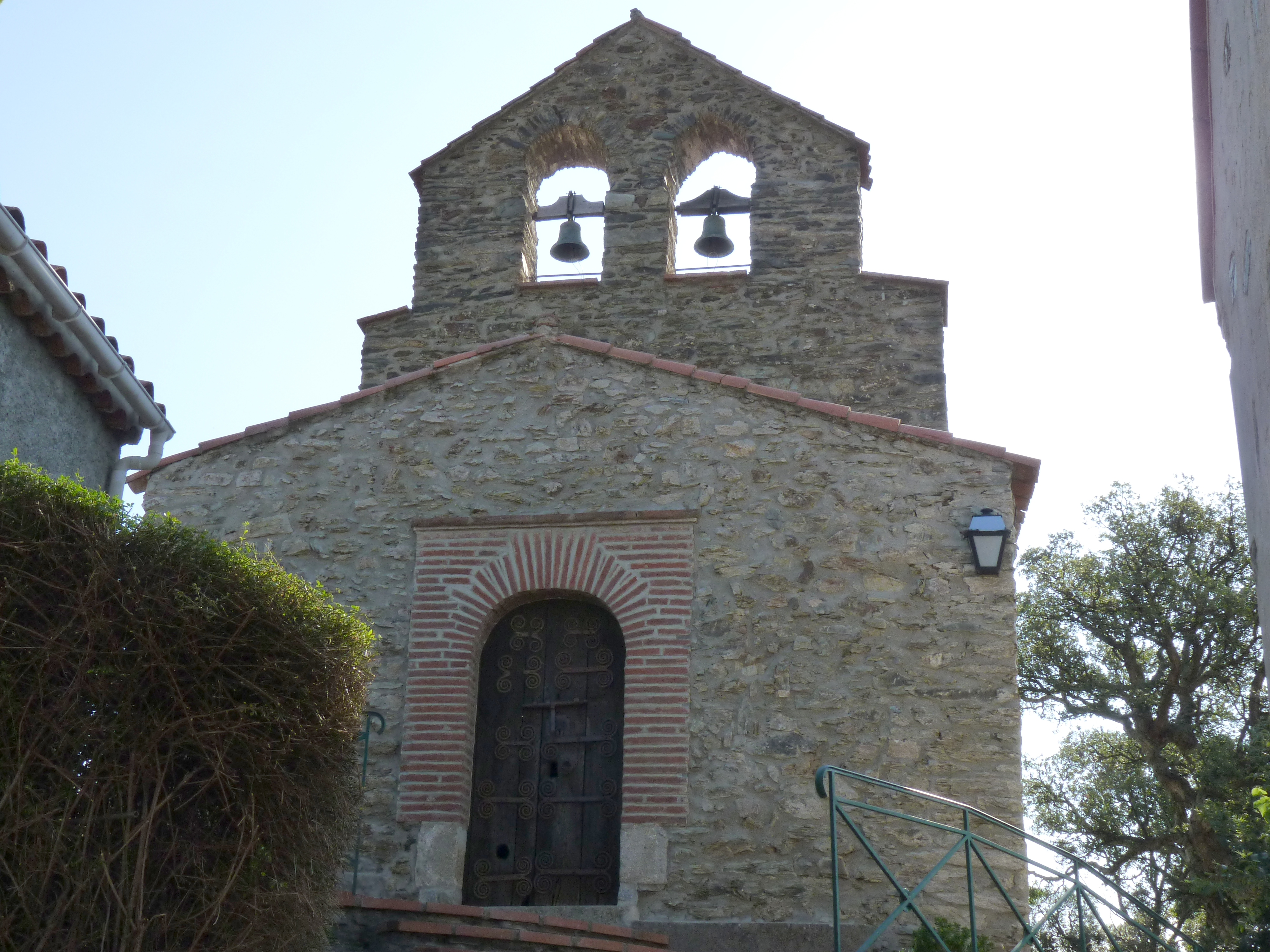 Notre-Dame de la Roure, Taillet (Pyrénées-Orientales, Languedoc-Roussillon, France)